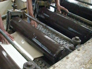 Proses penggilingan koagulum menjadi lembaran sit